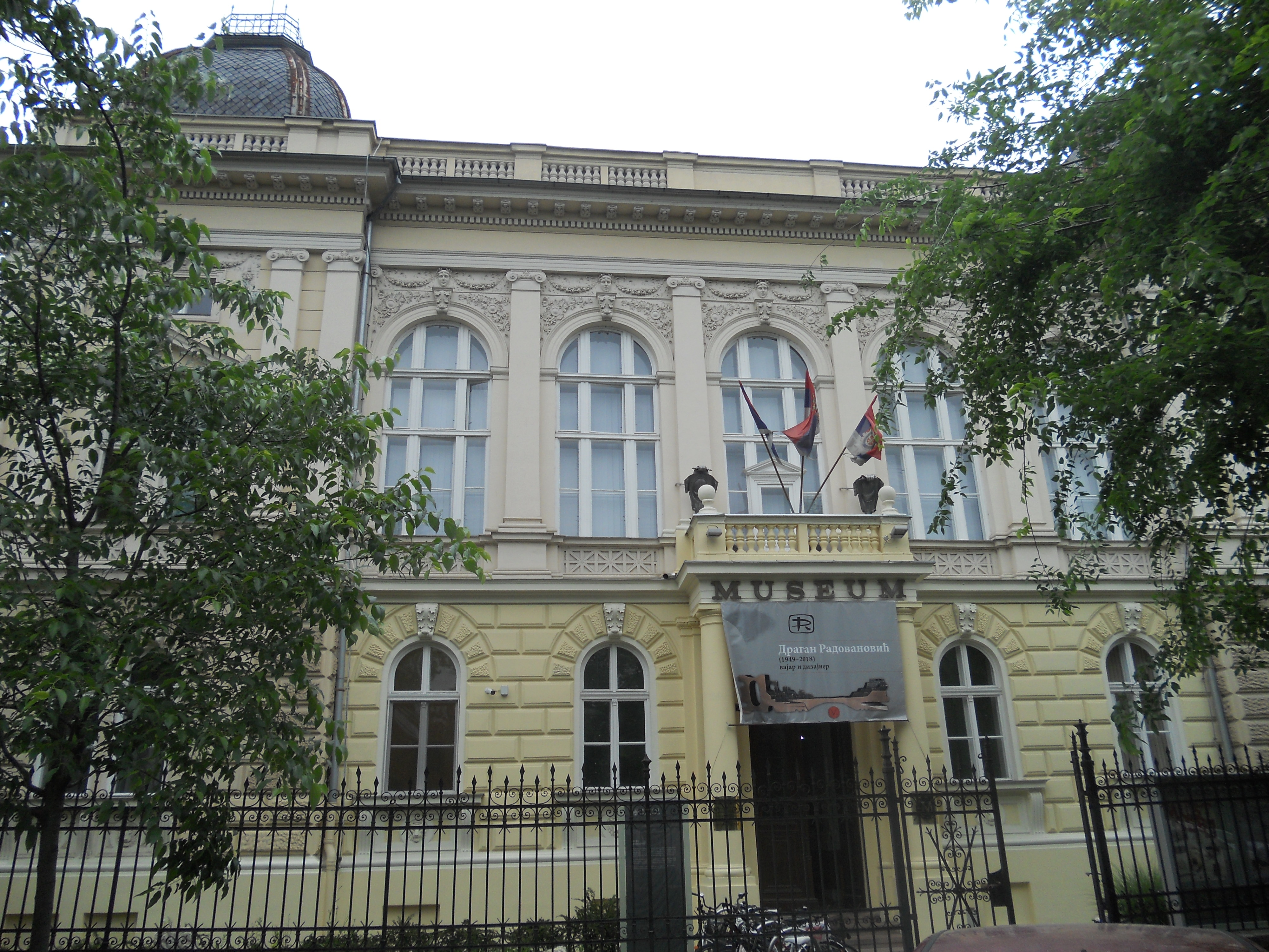 Dunavska (Novi Sad)